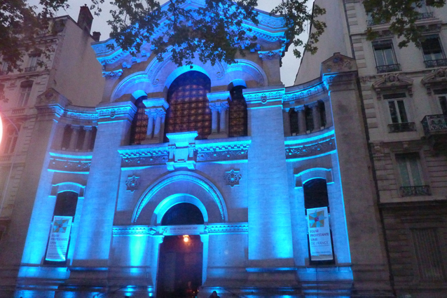 Façade du Grand temple, éclairée lors du 1er Synode national de l'Eglise protestante unie de France